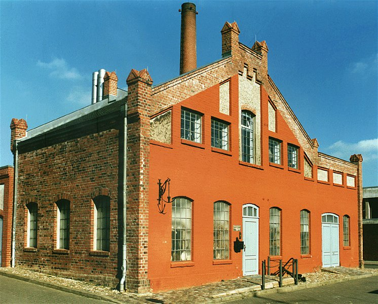 Stadtgeschichtliches Museum Uetersen -- Uetersen (Germany)- Building of the town-museum